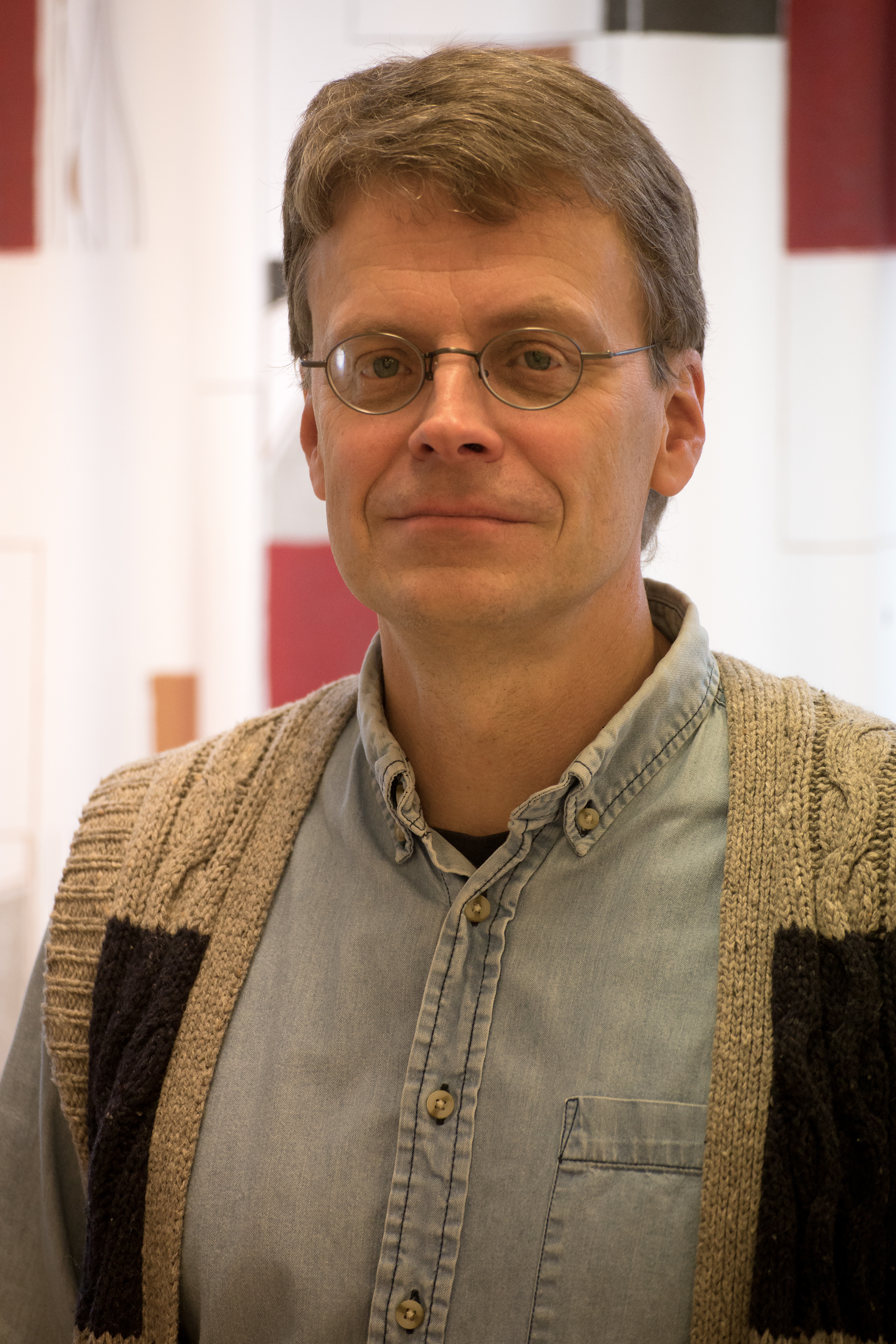 Tomas Nygren, teolog, högskolerektor.